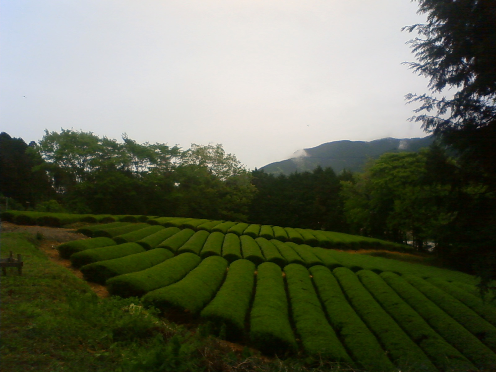 山梨県南巨摩郡南部町。茶畑（楮根）。